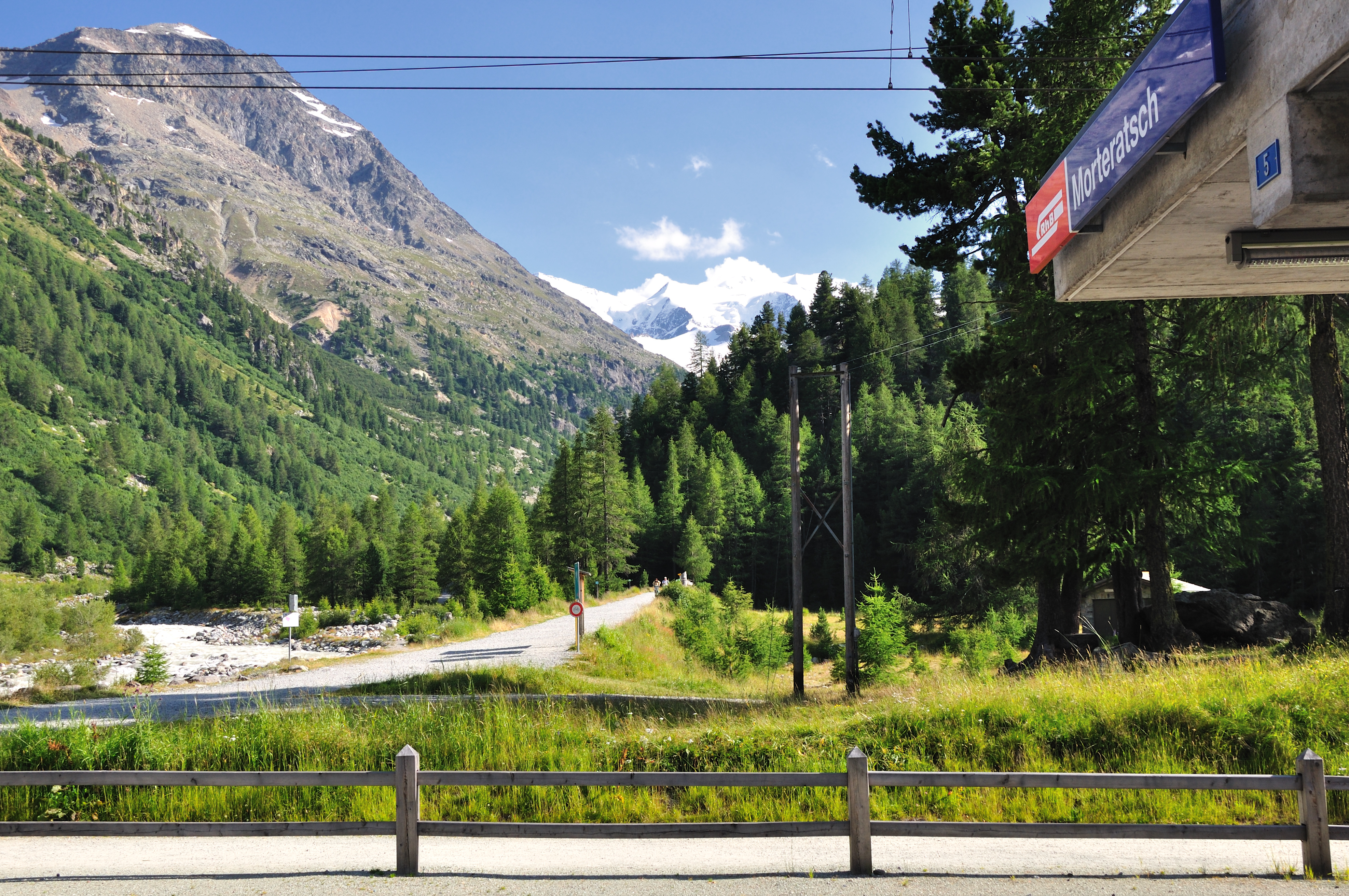 Switzerland, Graubünden, Morteratsch station